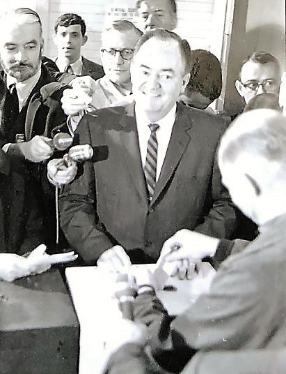 US-Vizepräsident Hubert H. Humphrey bei der Präsidentschaftswahl-Stimmabgabe in Waverly, Minnesota, am 3. November 1964